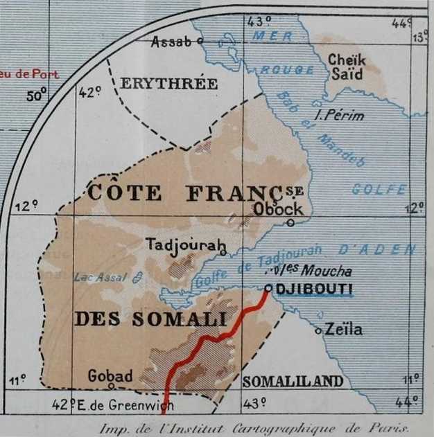 Carte de la Côte française des Somalis (c. 1923). Cheik-Saïd y est inndiqué comme possession française. Une des cartes en annexe à "La mise en valeur des colonies françaises" par Albert Sarraut (1923).